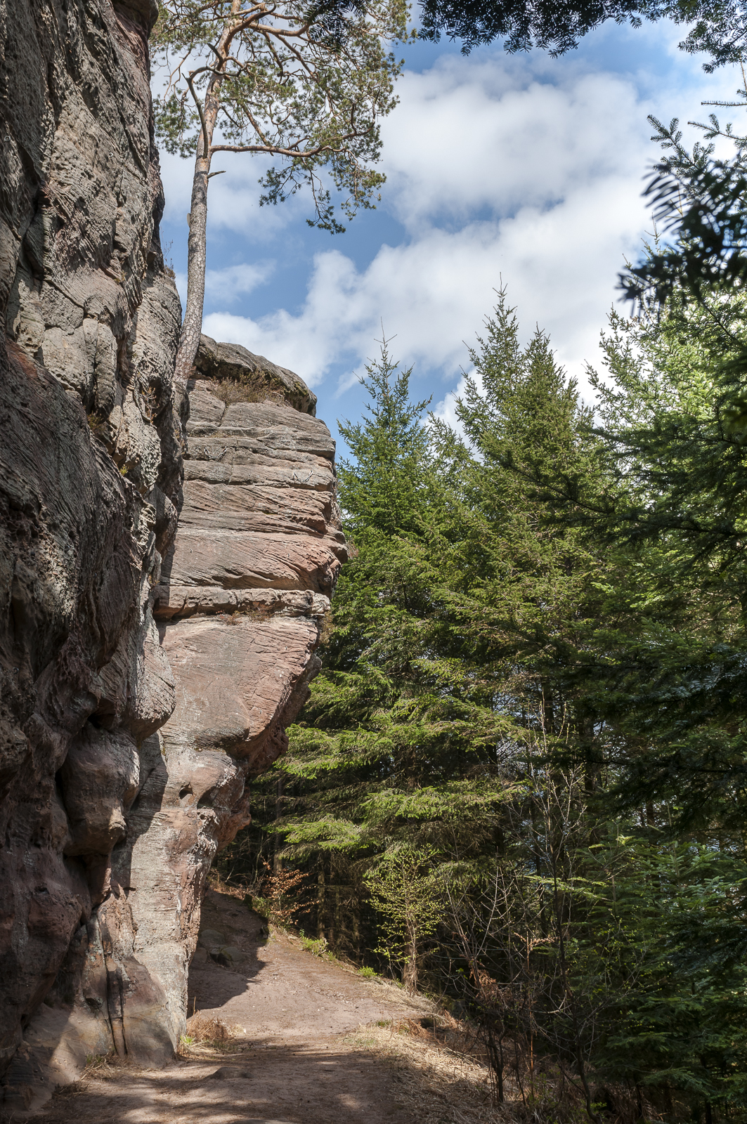 Les Roches de Pointhaie à Bruyères dans les Vosges. Photographie prise du sentier qui chemine à la base des roches.